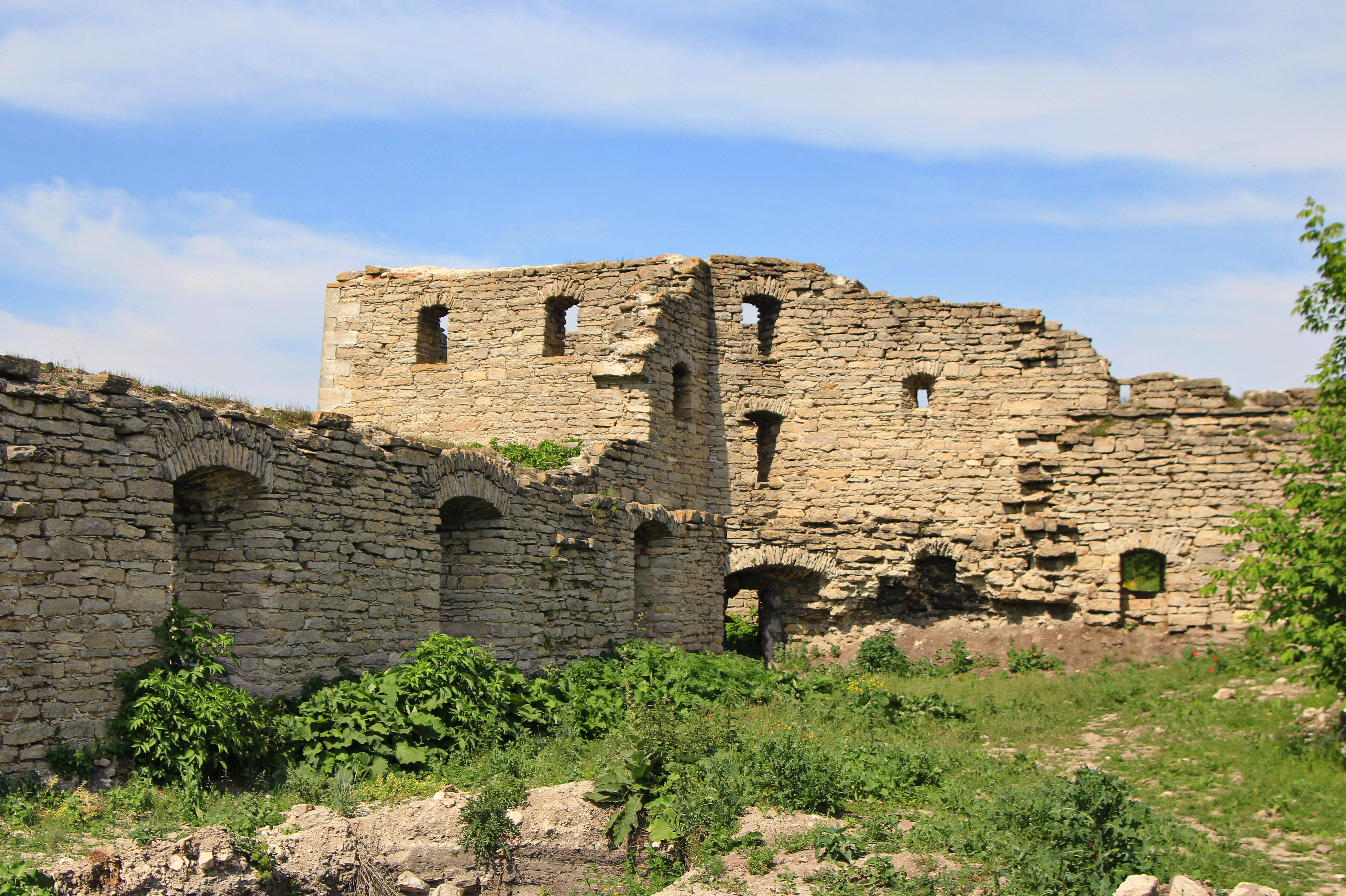 Замок (мур.), смт Сатанів